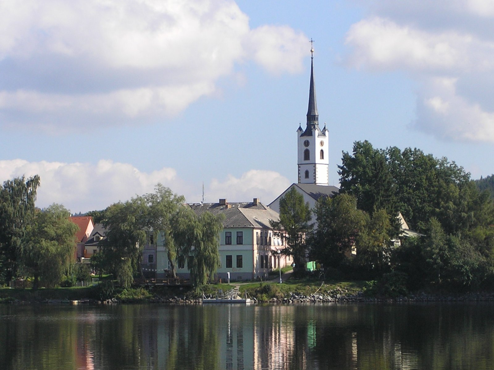 vlozeni obrazku Frymburku (CK). Autorem jsem ja (Nikolai).